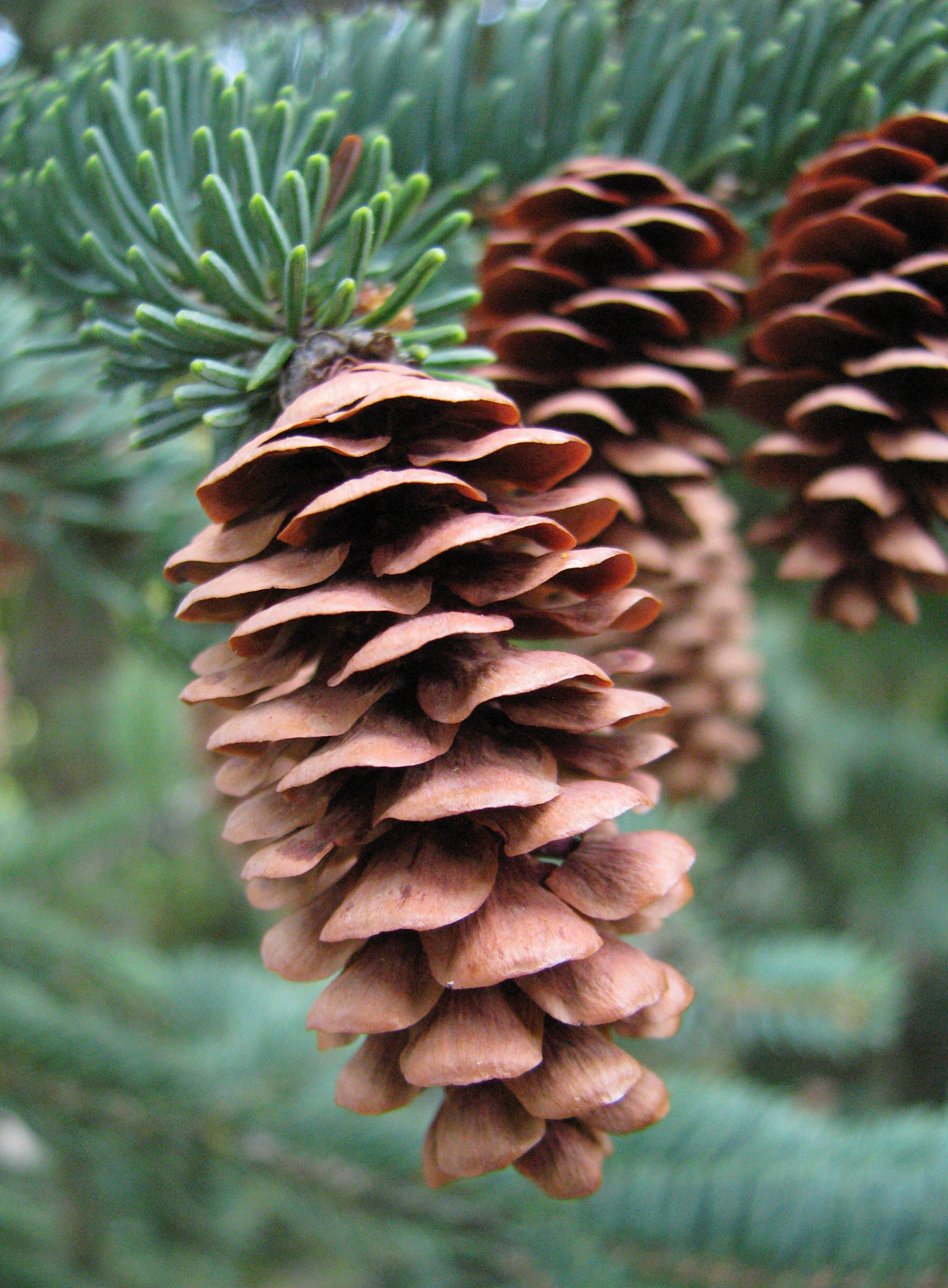 Świerk biały (Picea glauca), szyszki nasienne, okaz uprawiany. Ogród Botaniczny Uniwersytetu Wrocławskiego, Wrocław, Polska.